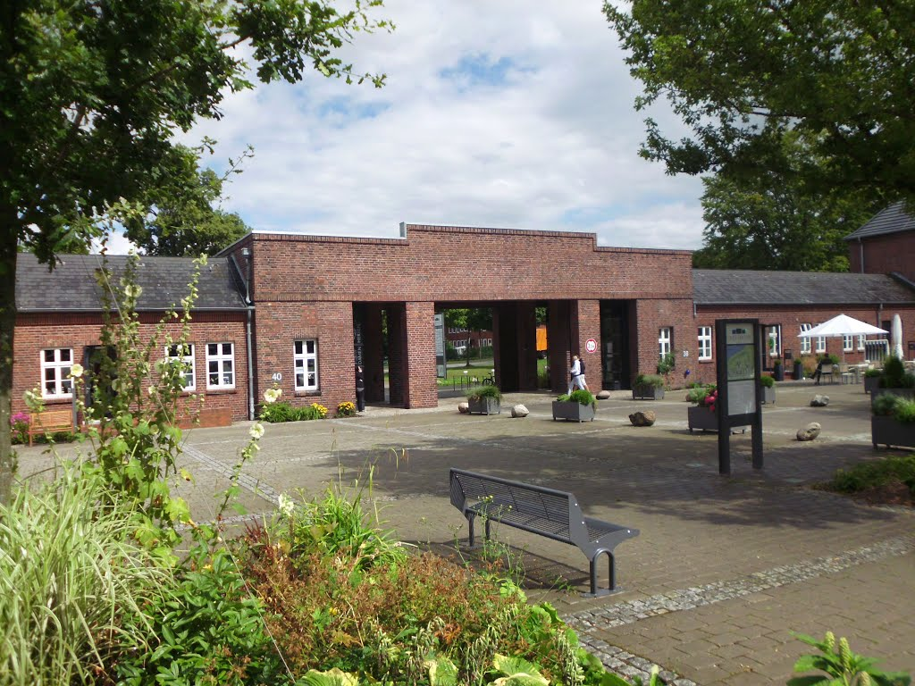 Haupttor der ehemaligen Kaserne Carshöhe